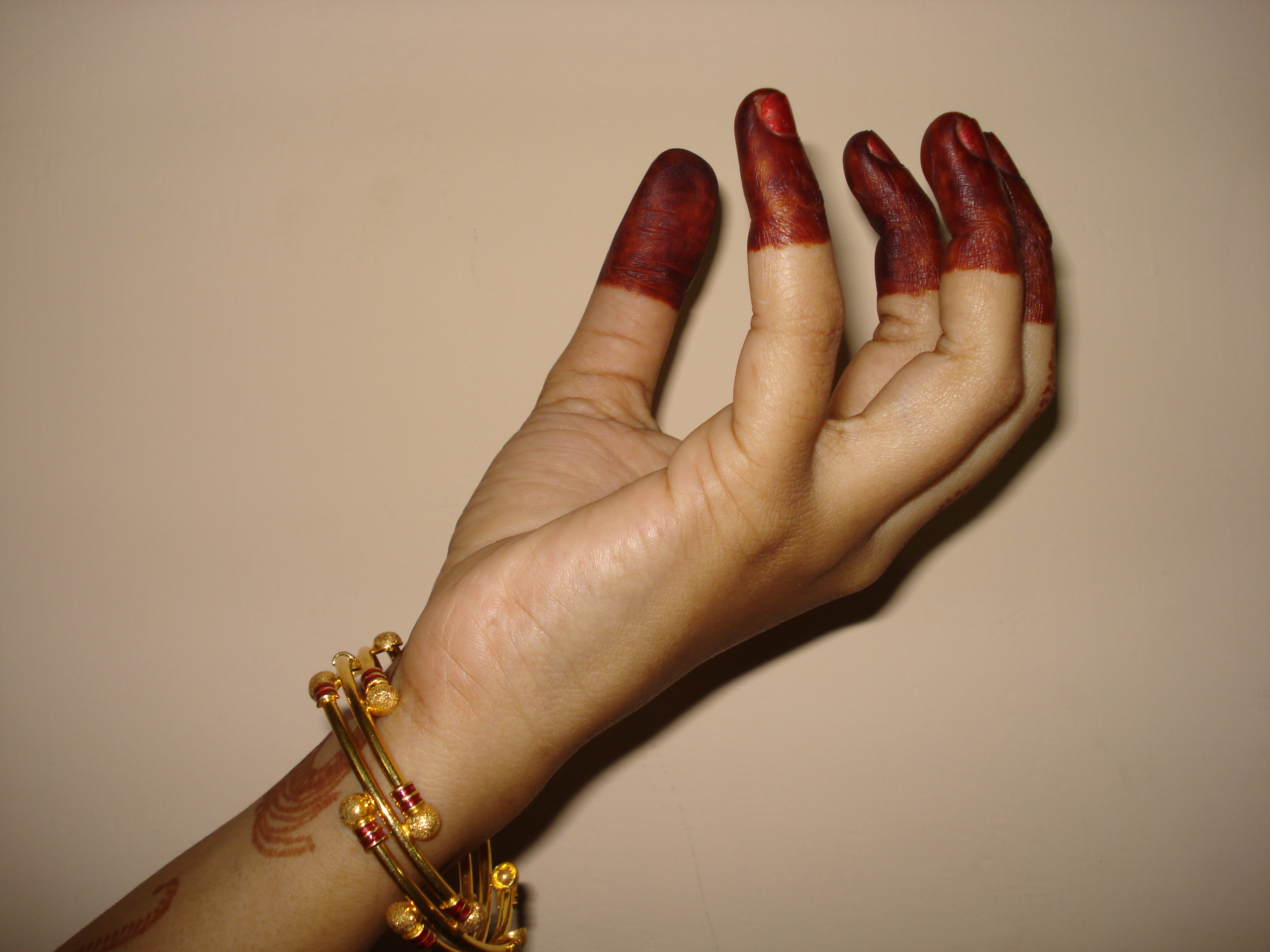 പദ്മകോശഹസ്തം